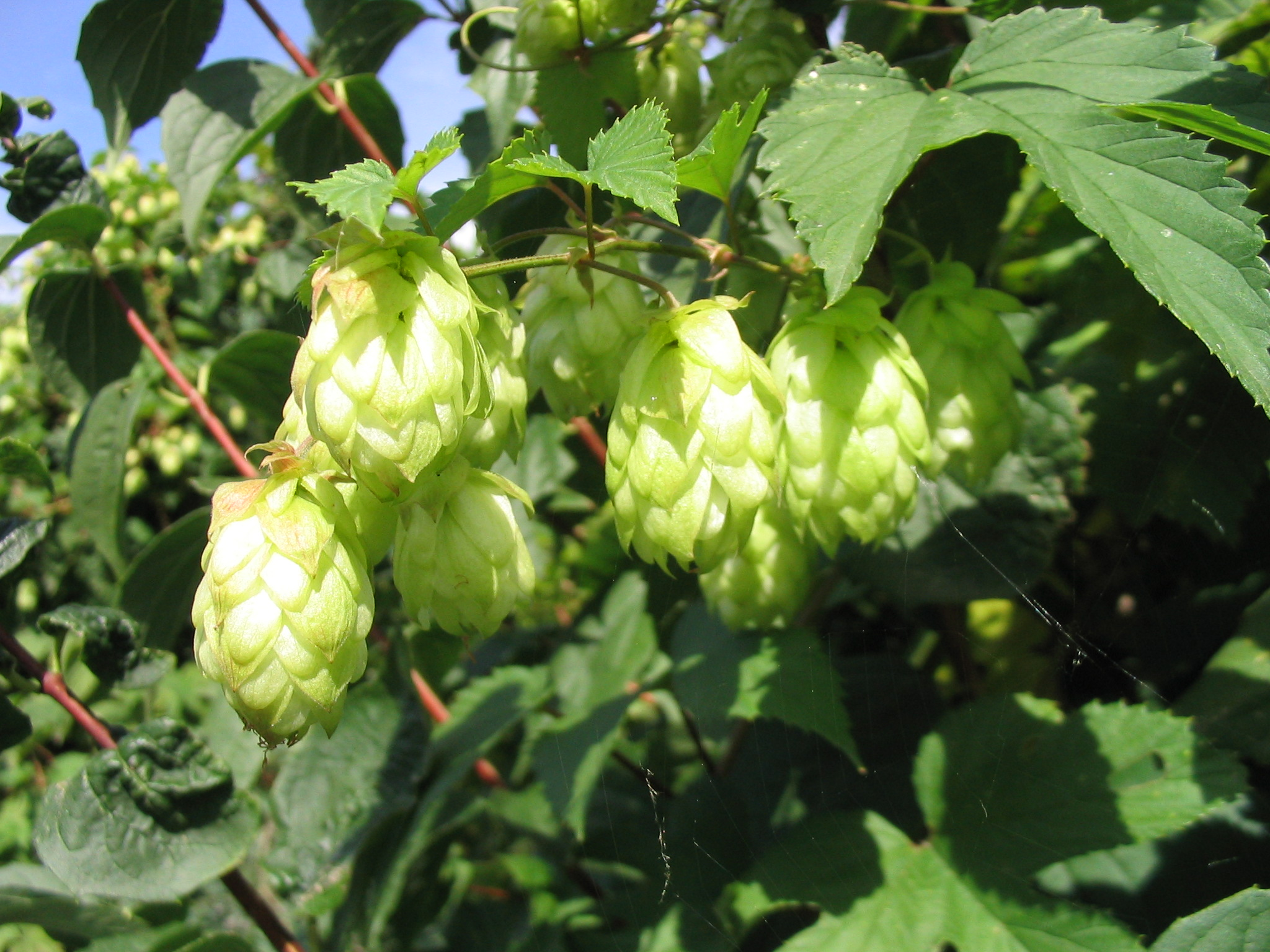 Fruchtstand von Wildem Hopfen, Humulus lupulus, fotografiert am 22.08.2004 Fotograf: Dr. Hagen Graebner